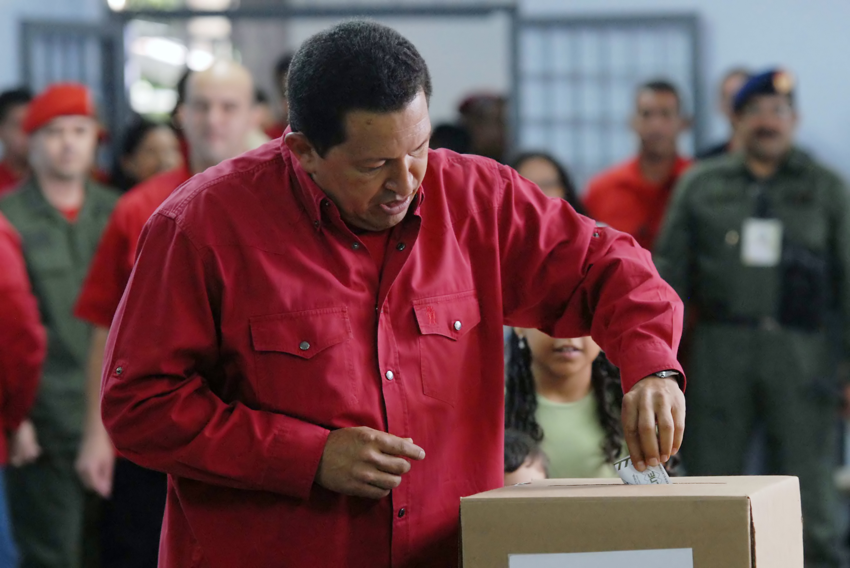 El Presidente de Venezuela, Hugo Chávez emitiendo su voto el 2 de diciembre de 2007.